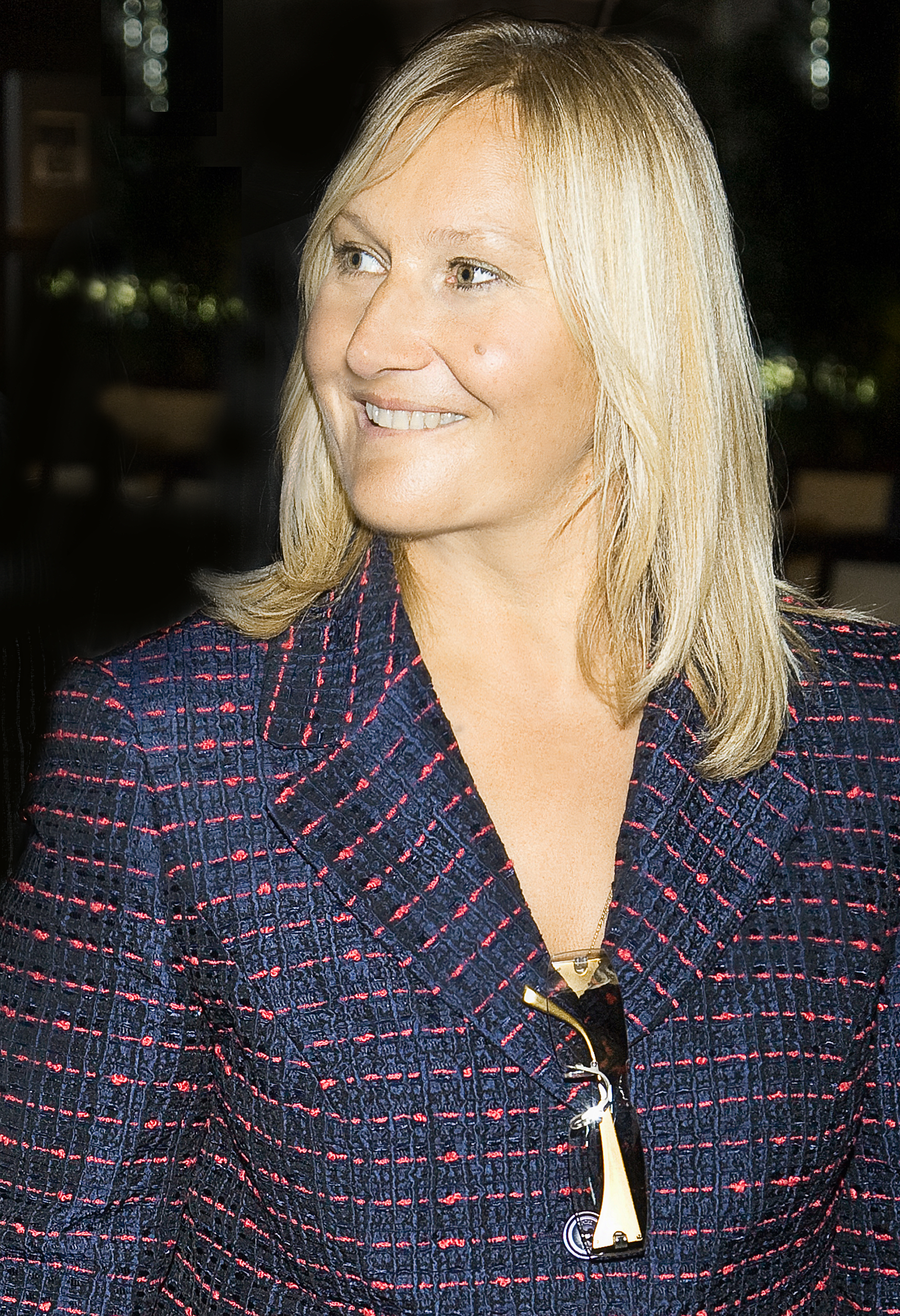 Елена Батурина / Yelena Baturina